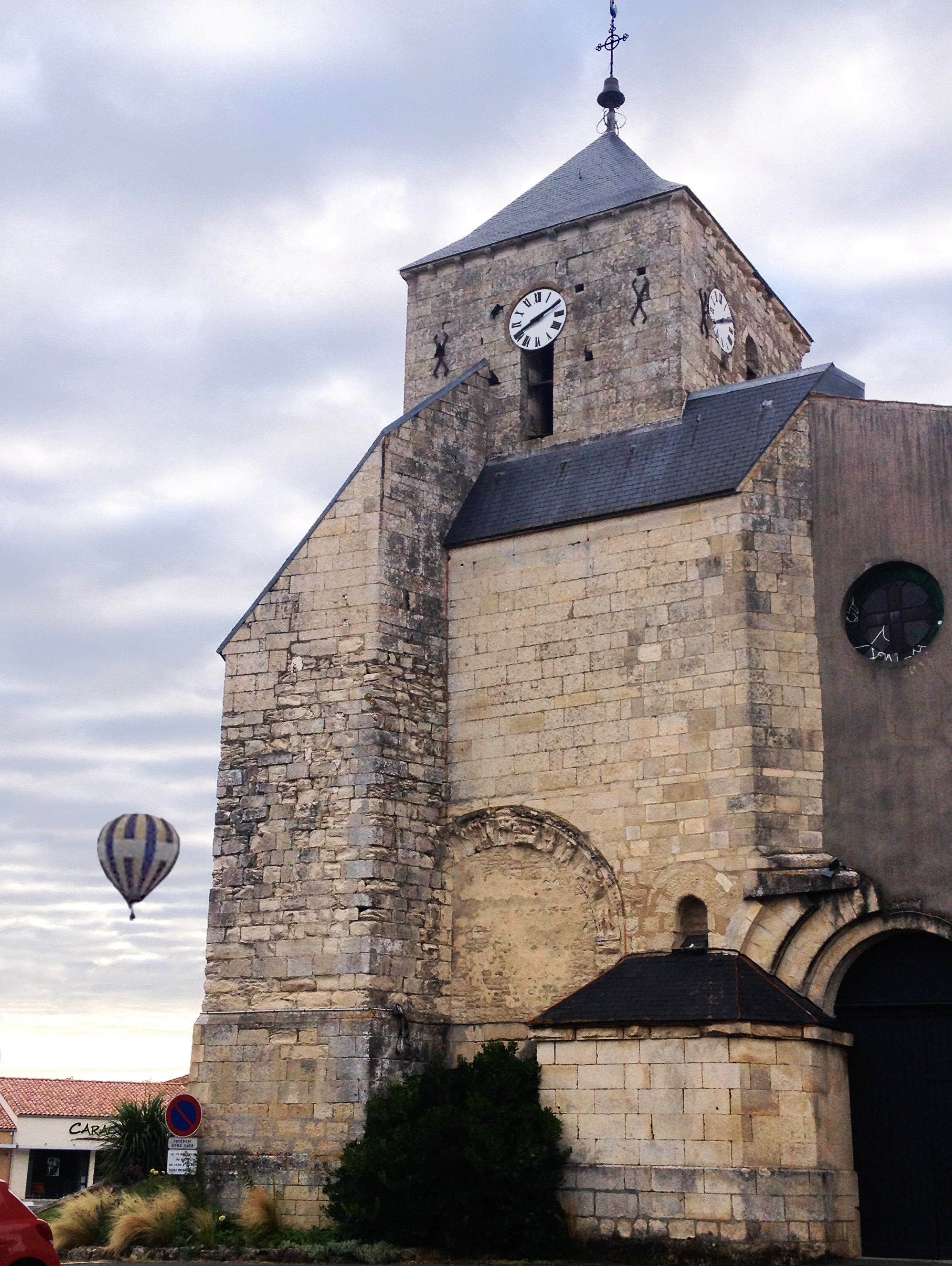 Les montgolfières qui survolent le Marais poitevin passent régulièrement au-dessus de l'église romane de Mauzé sur le Mignon.